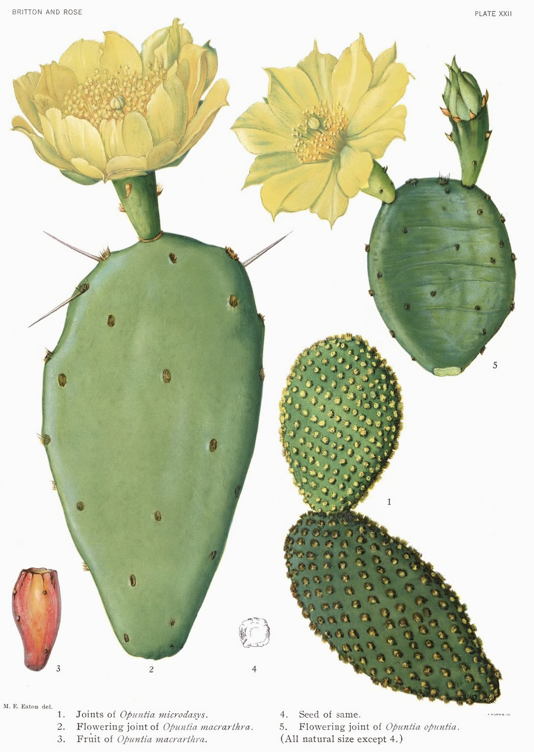 Opuntia Cacti Illustration